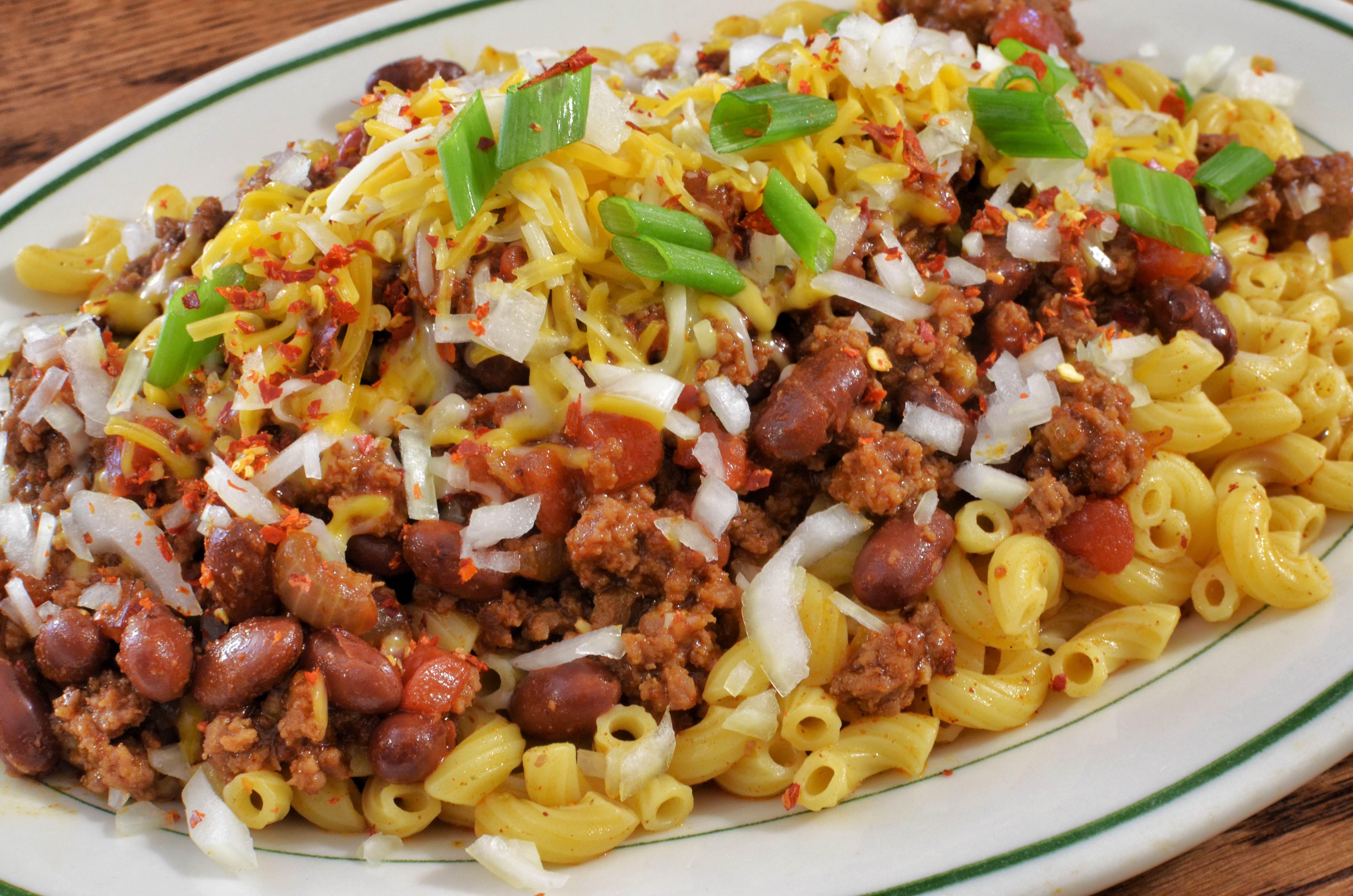 Chili mac